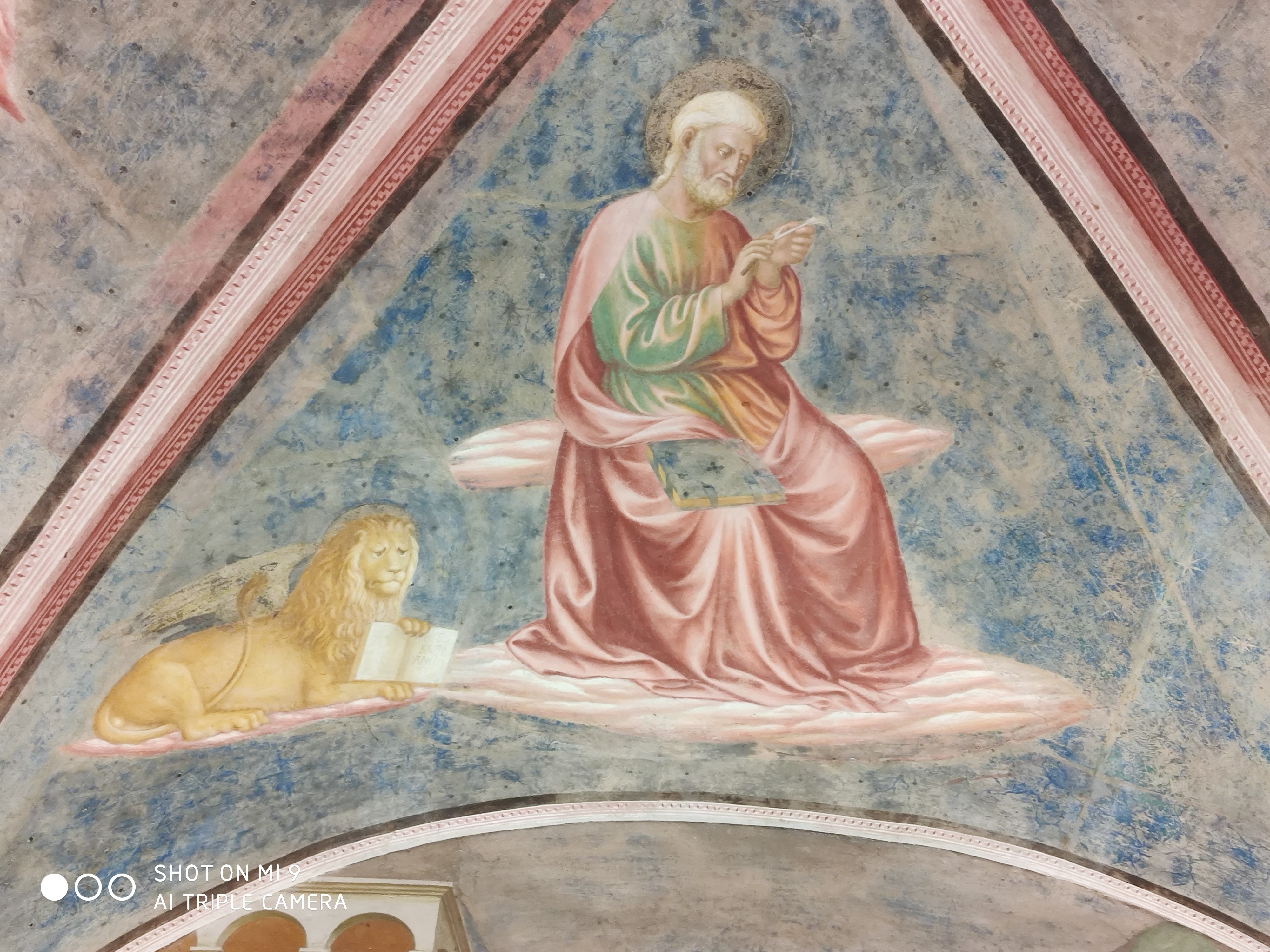 San Marco con il suo simbolo al fianco affrescato sulla volta del Battistero della Collegiata di Castiglione Olona